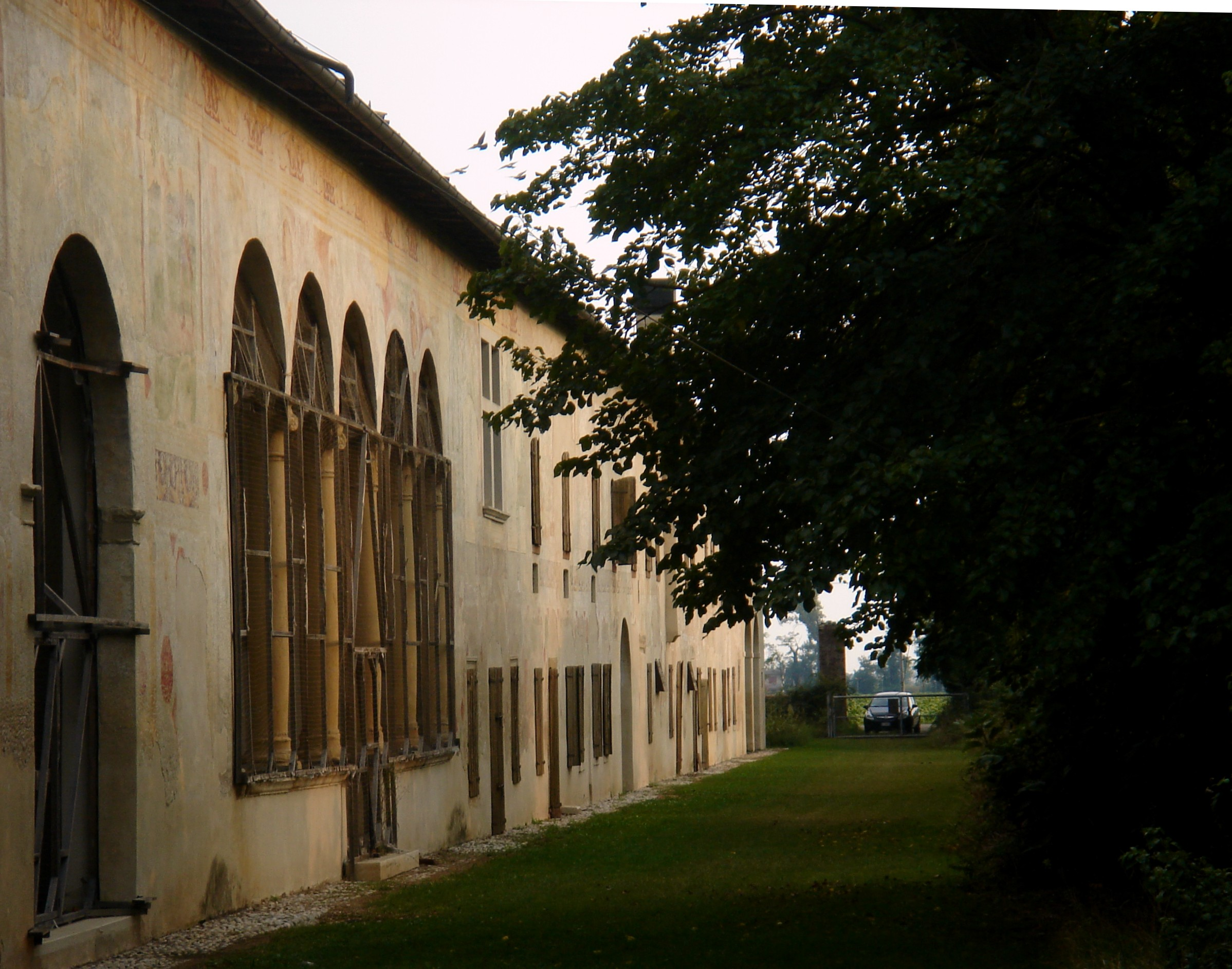 Altivole (TV): Barco della Regina Cornaro, XV secolo.